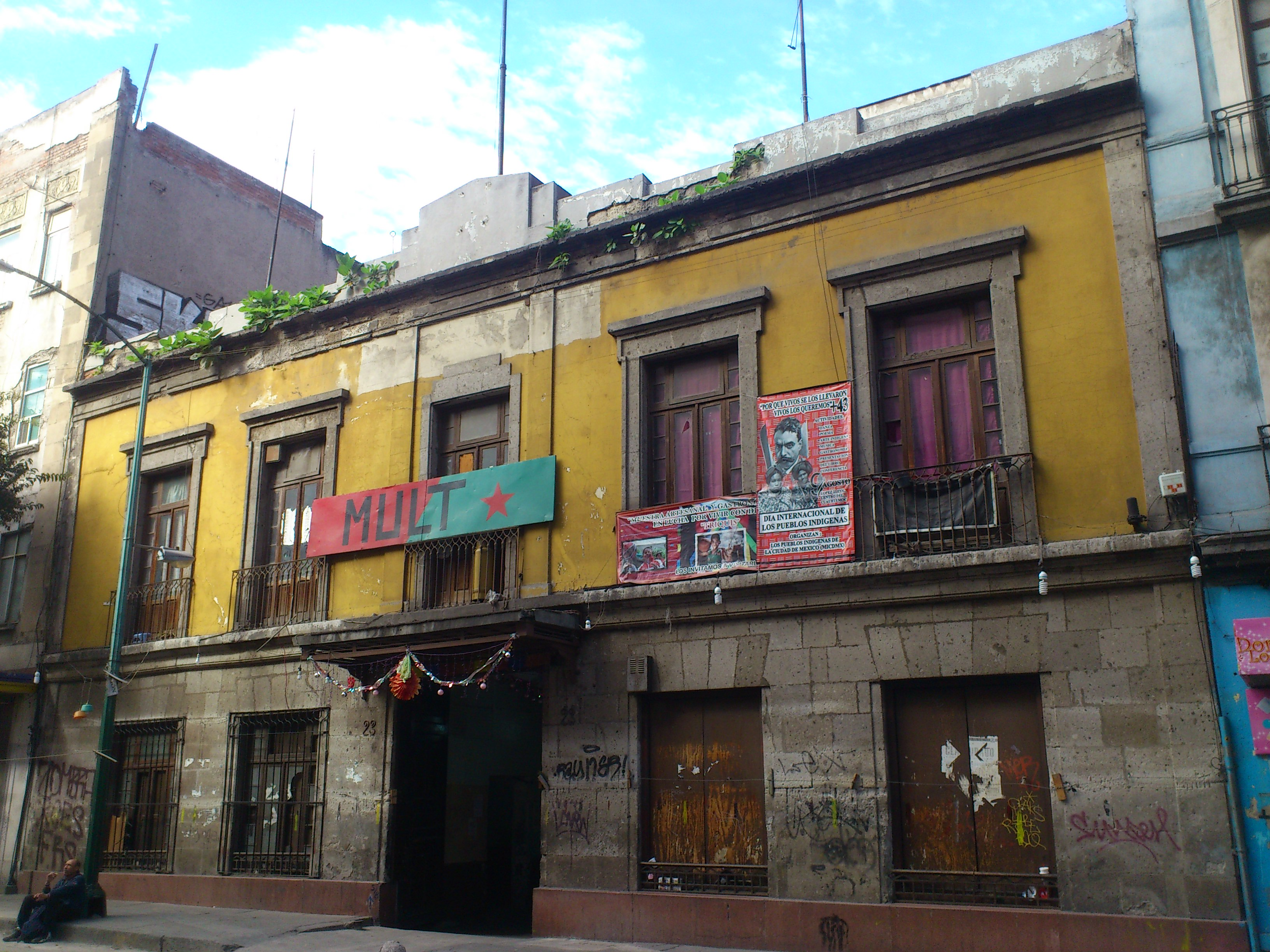 Ruinas del antiguo casino Alemán en la Ciudad de México